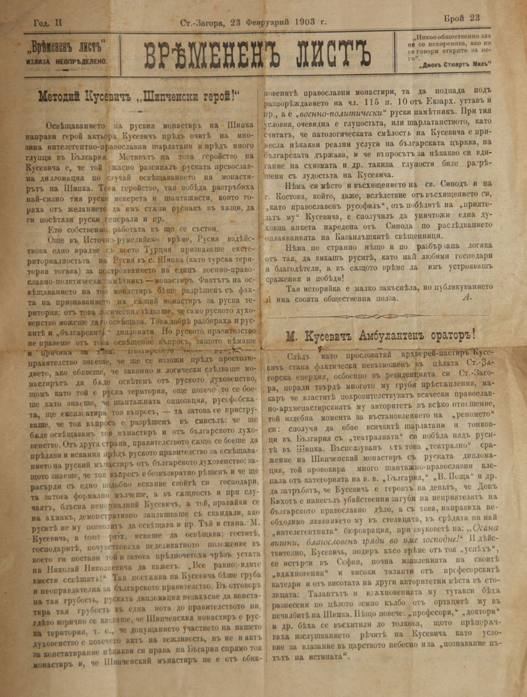 Вестник "Временен лист"